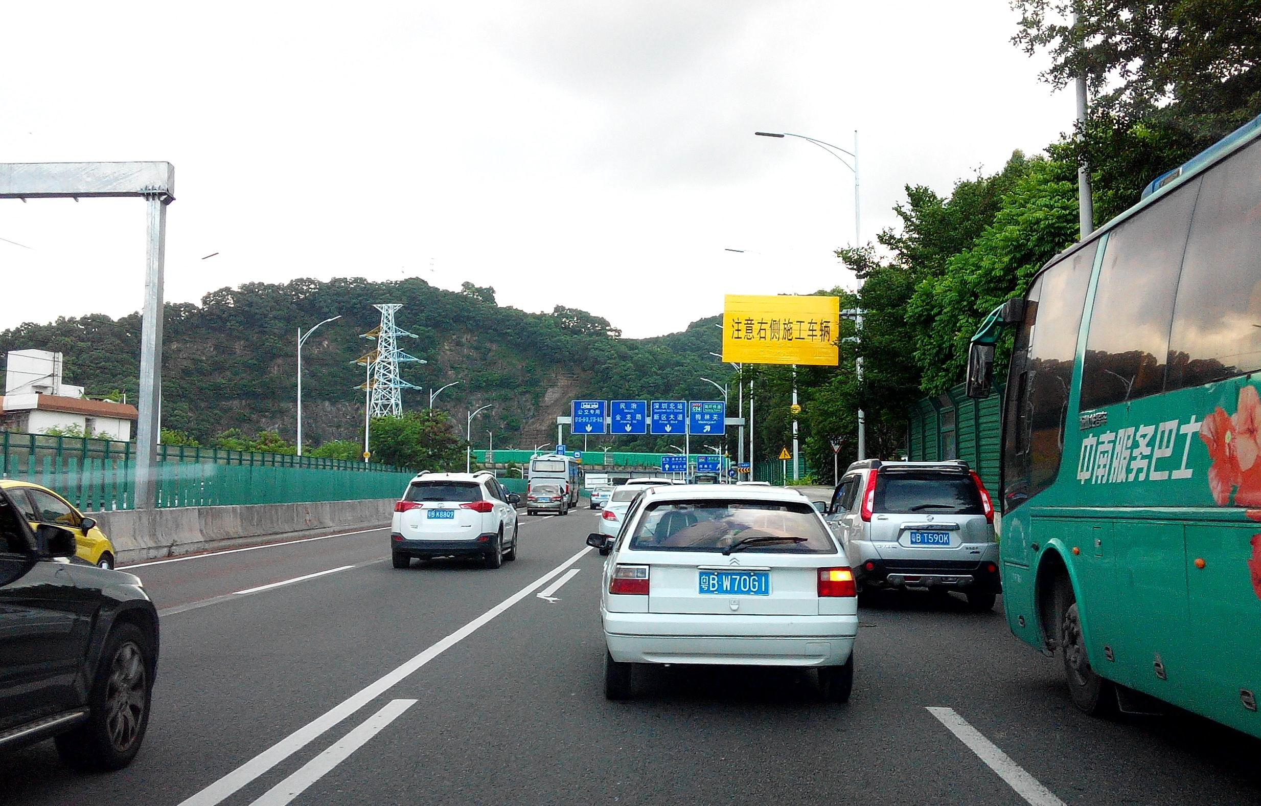 深圳市皇岗路（梅林段近新彩通道）